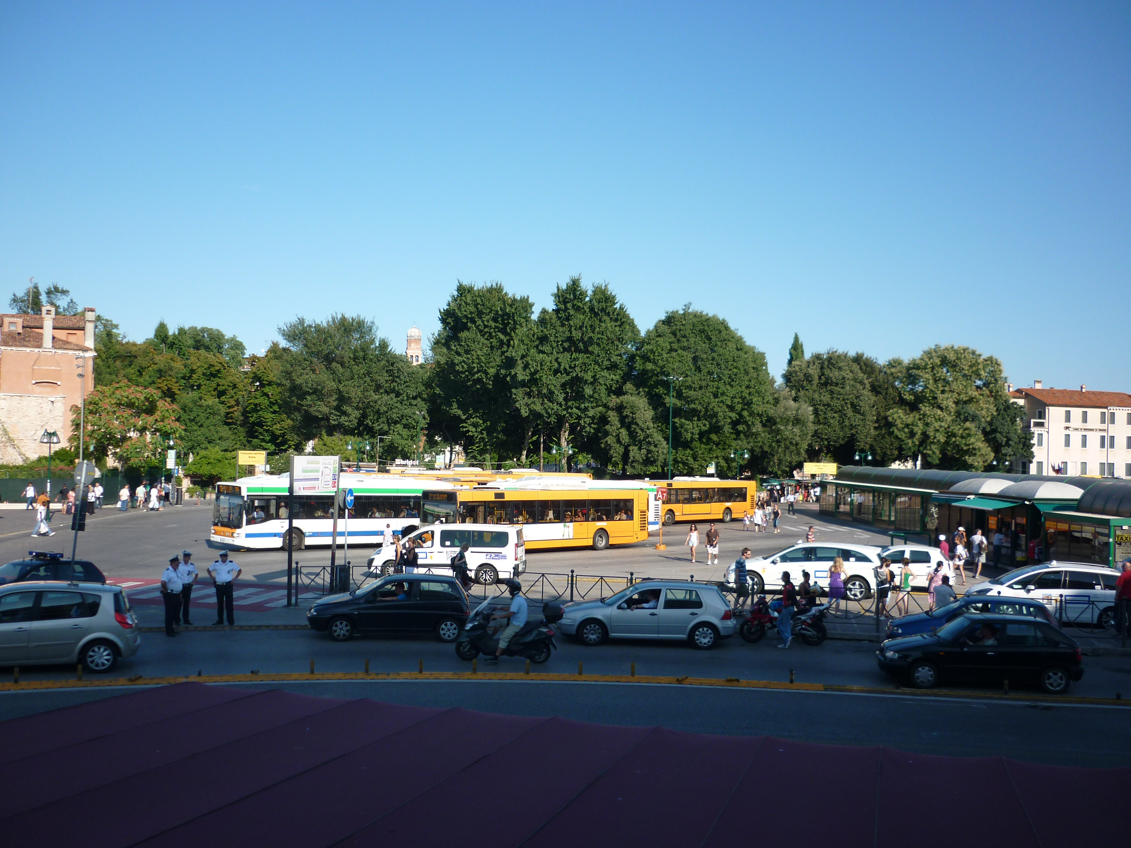 Piazzale Roma (Venezia) capolinea dei bus e taxi